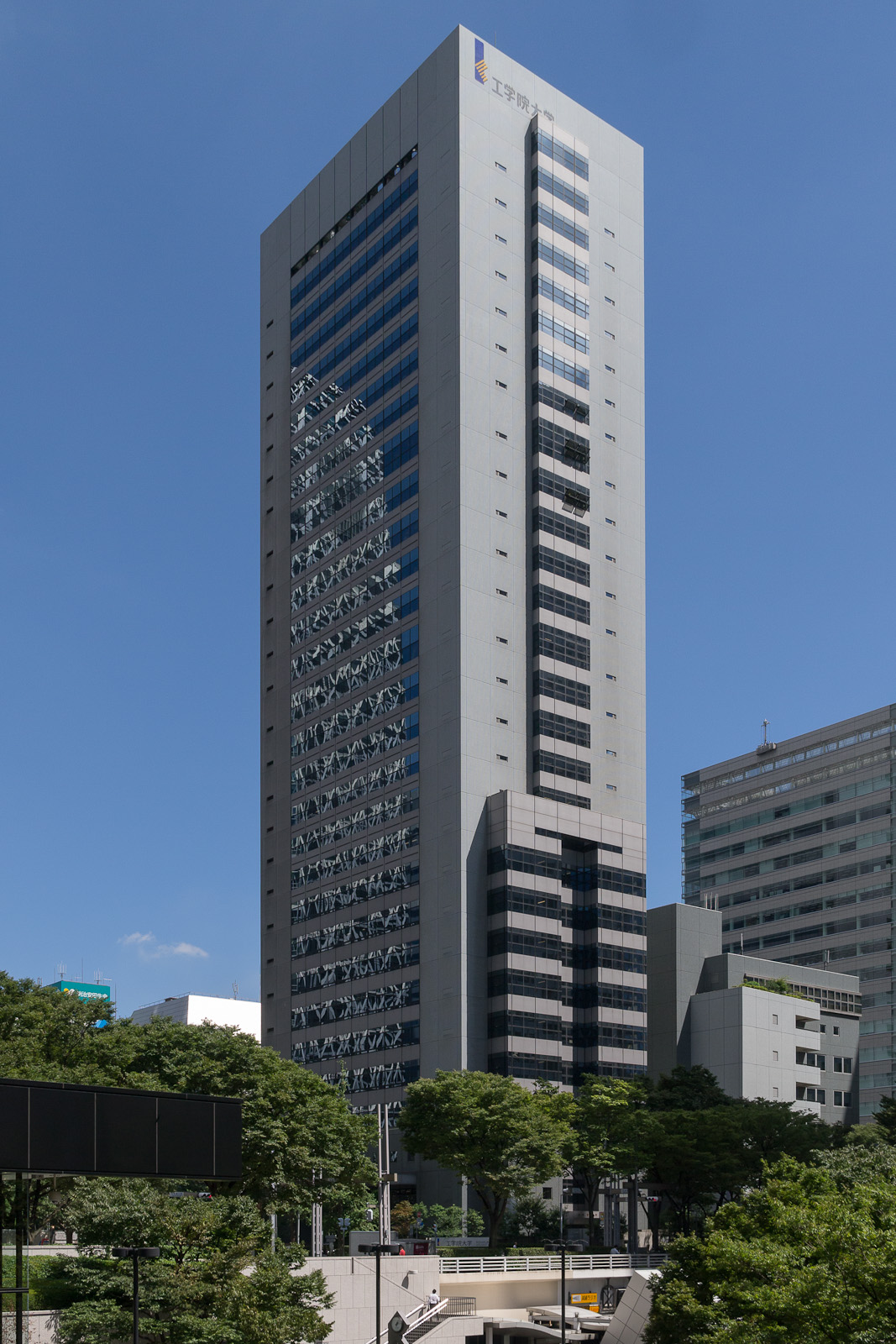 工学院大学、東京都新宿区西新宿。